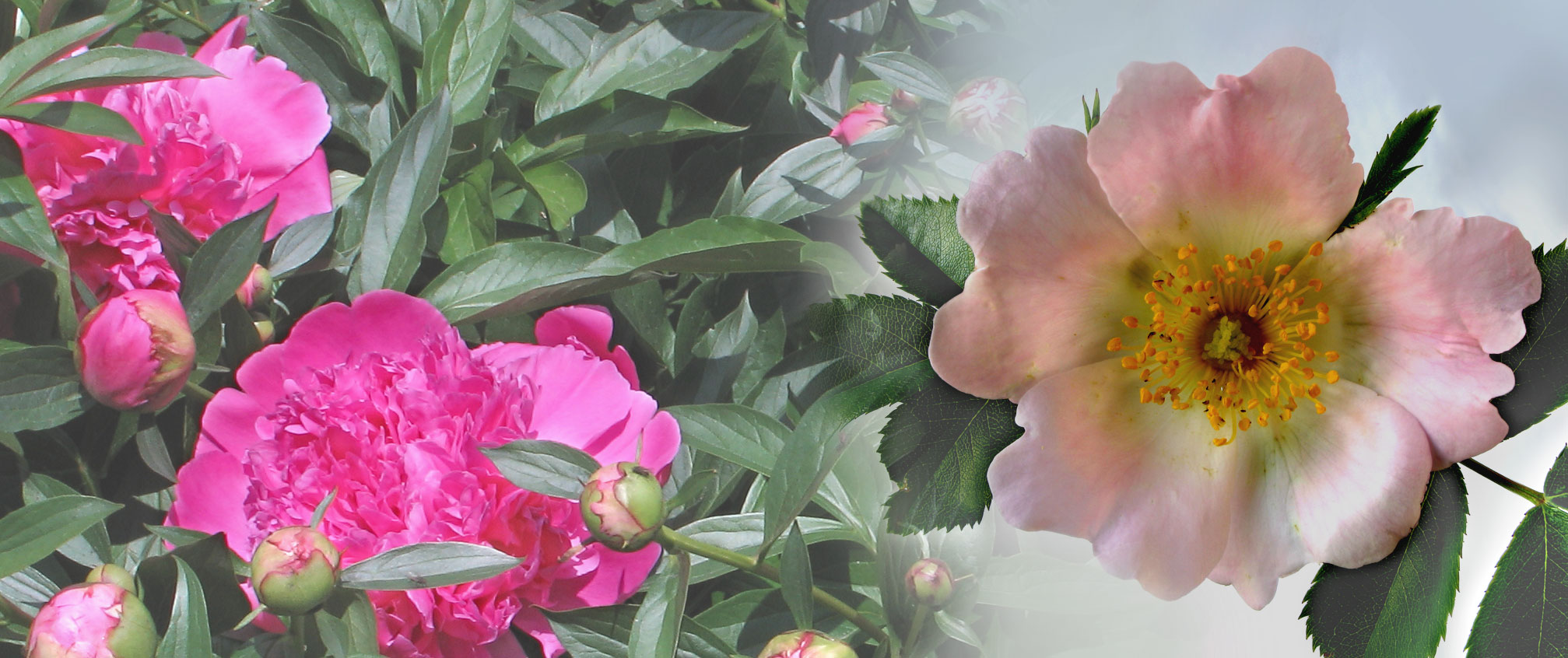 Blütenmontage